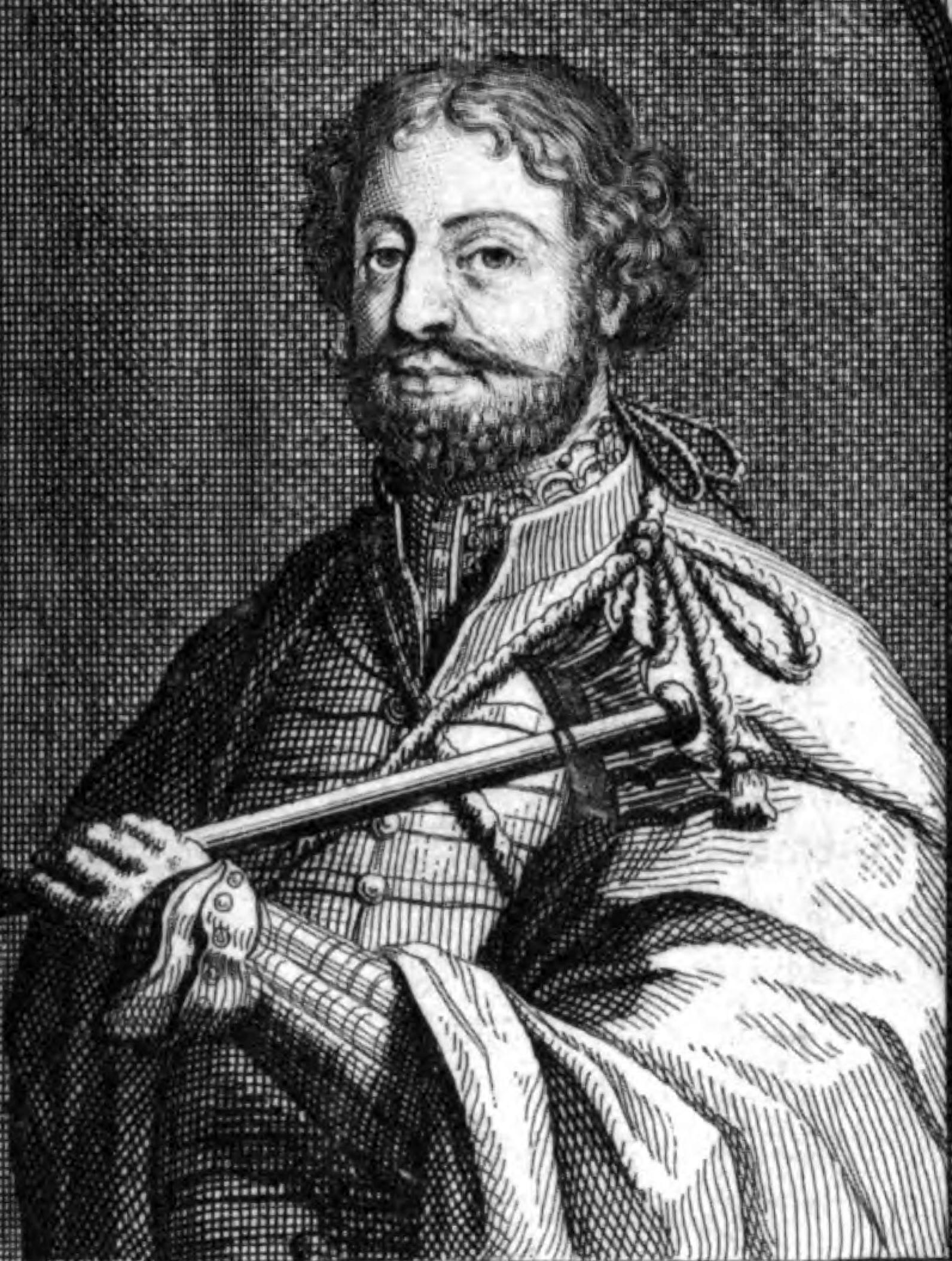 behelzende eene beschryving van verscheidene Tartersche en nabuurige gewesten, in de noorder en oostelykste deelen van Aziën en Europa ... ontworpen, beschreven, geteekent, en in 't licht gegeven